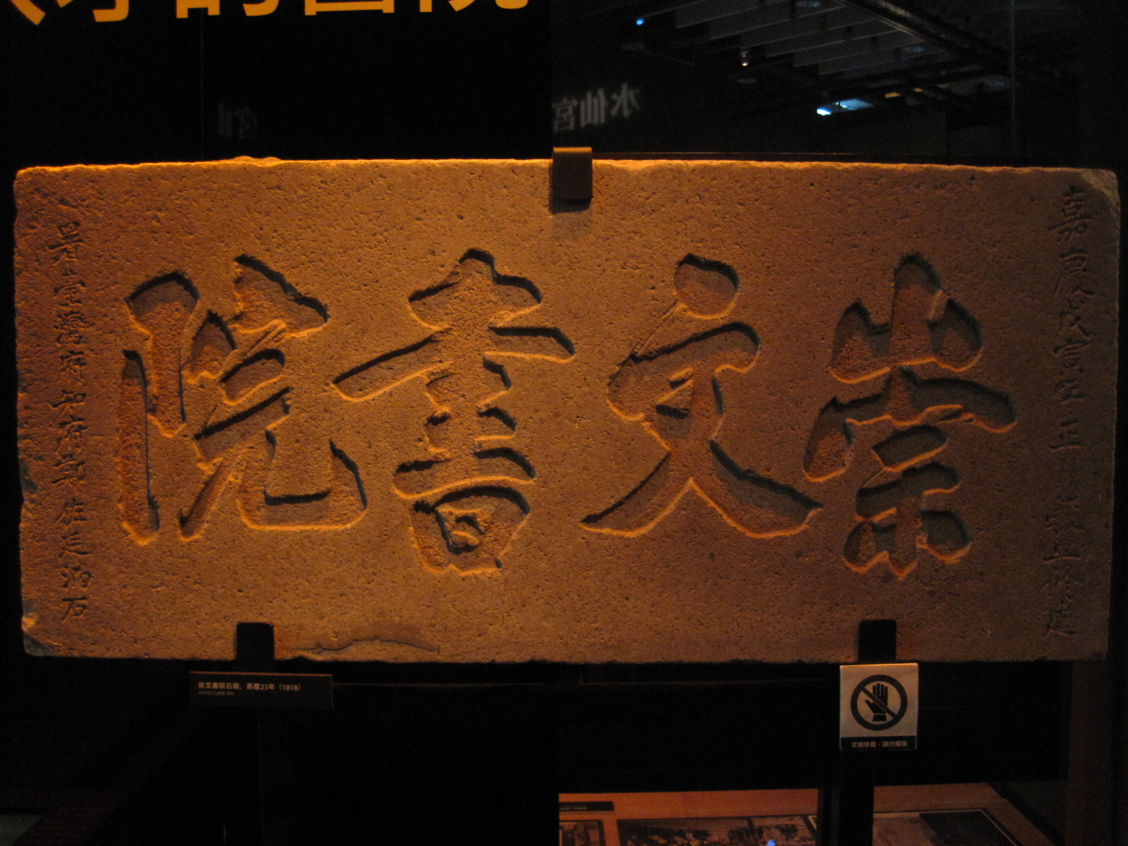 中文（台灣）: 崇文書院石碑